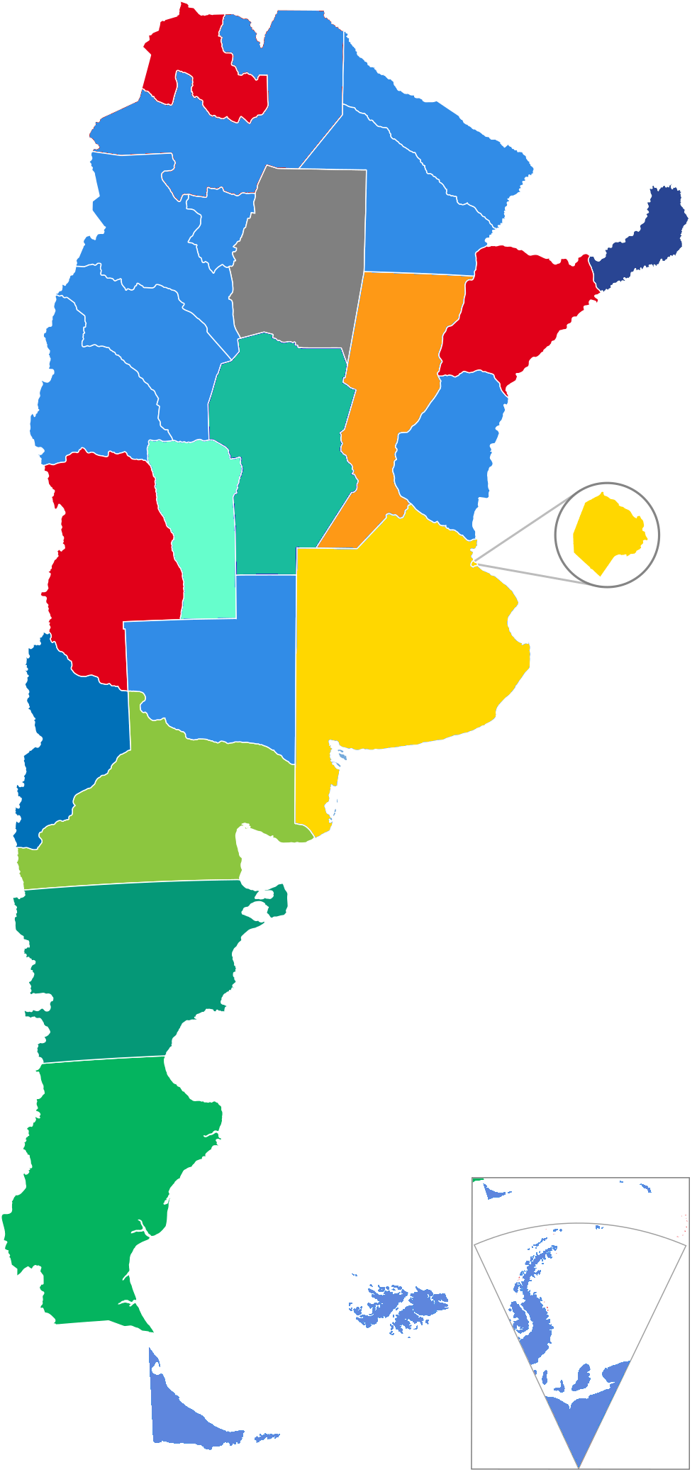 Argentina 2015. Poderes ejecutivos distritales (provincias y CABA) según la alianza nacional a la que pertenecían los partidos provinciales que integraron las alianzas provinciales ganadoras. Frente para la Victoria (12) Alianzas provinciales sin alianza nacional (3) Cambiemos-Unidos por una Nueva Alternativa (UNA)-Progresistas (2) Cambiemos (3) Cambiemos-Progresistas (1) Unidos por una Nueva Alternativa (UNA) (1) Compromiso Federal (1) Movimiento Popular Neuquino (1)